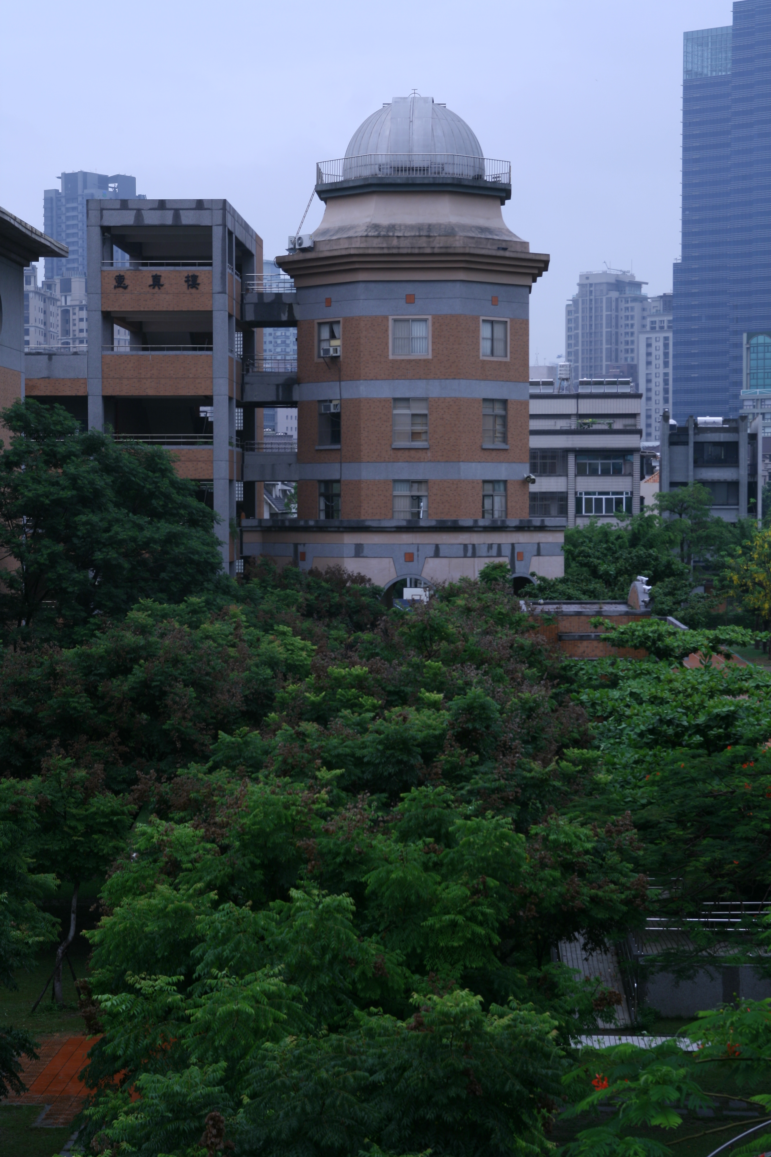 臺中市惠文高中獨棟RC結構天文臺